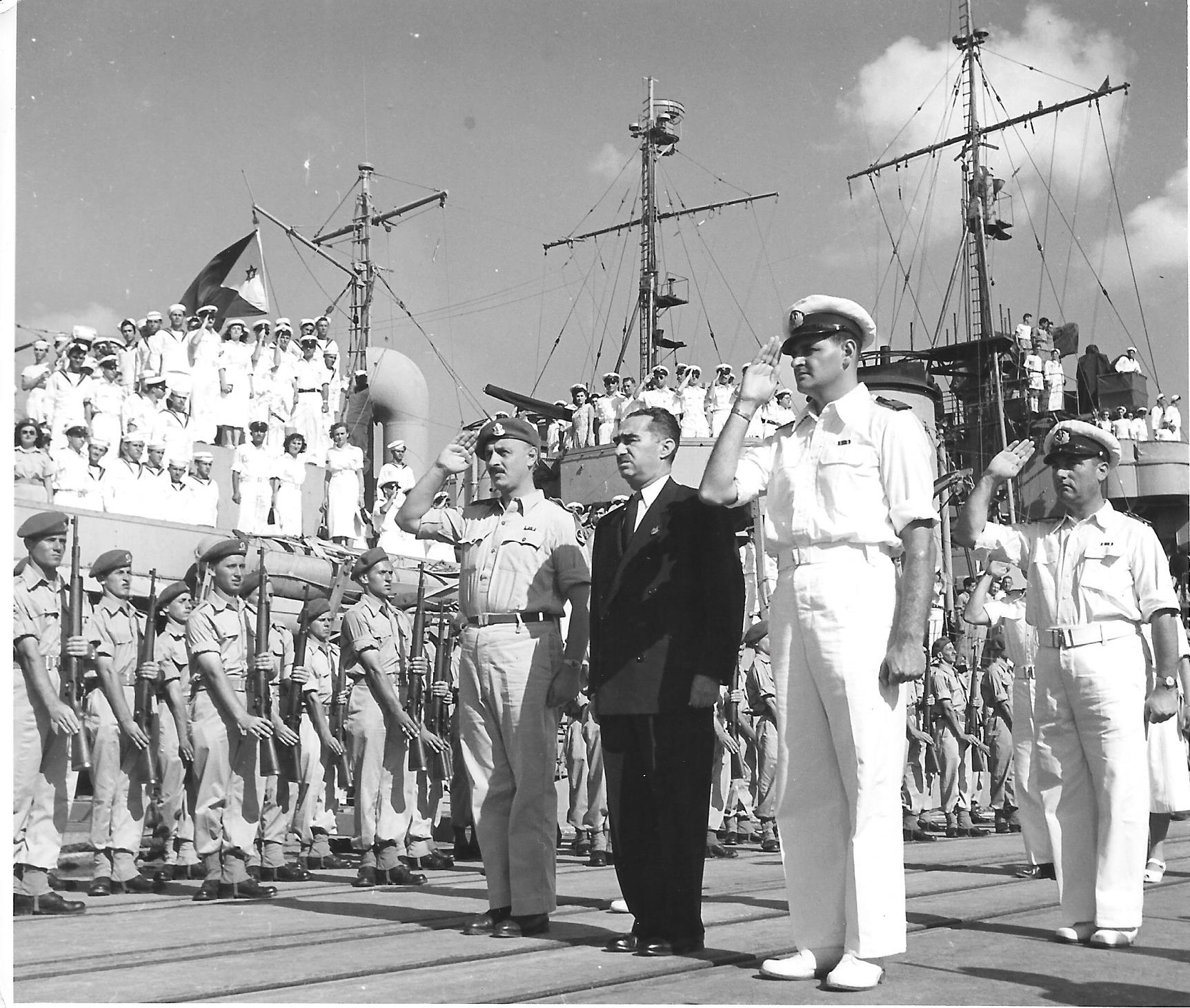 שר החוץ משה שרת והרמטכ"ל יגאל ידין מבקרים בחיל הים מלווים על ידי מפקד החיל מרדכי לימון וסגנו שמואל טנקוס